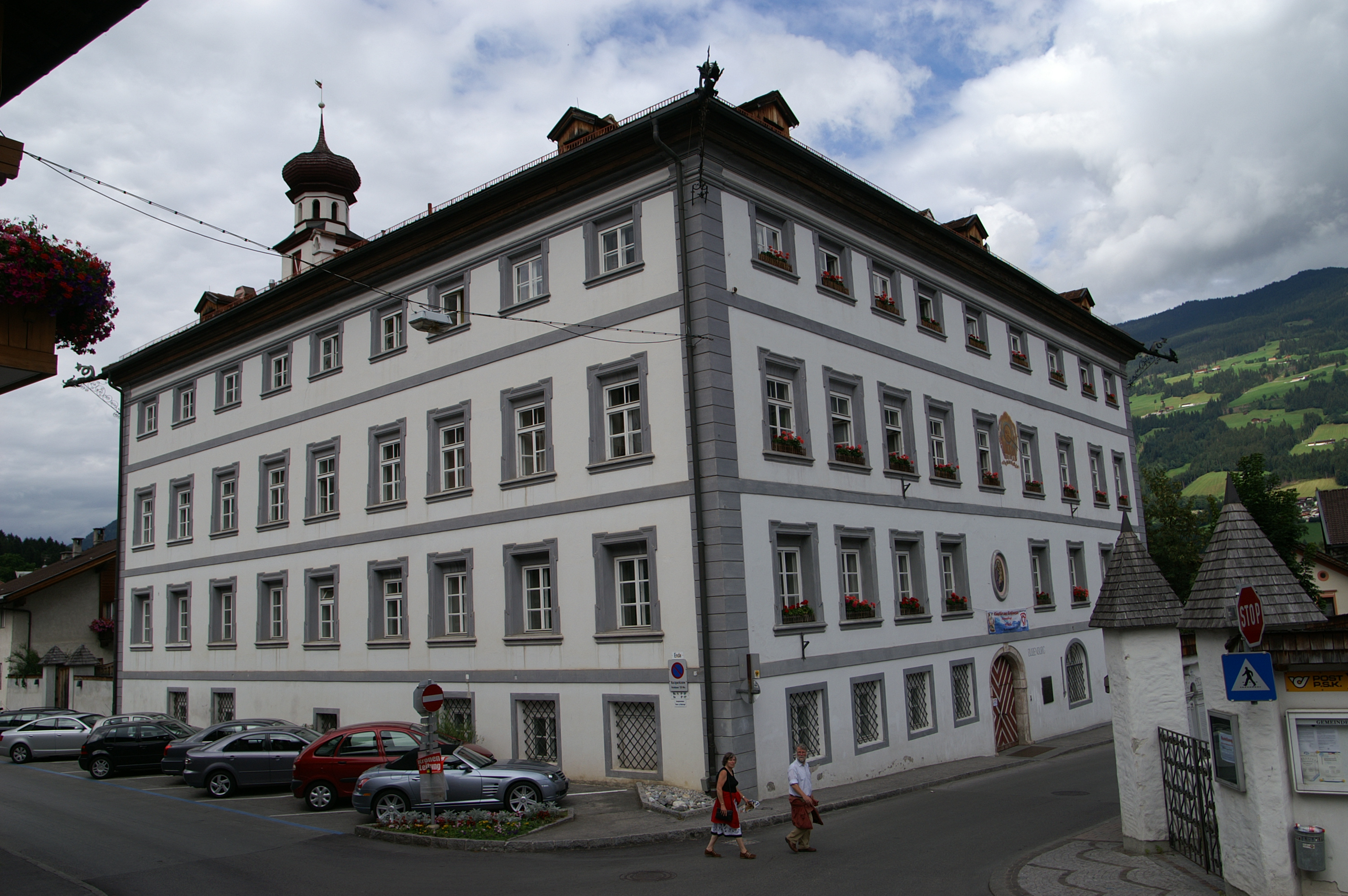 Gemeinde Fügen im Zillertal, Tirol